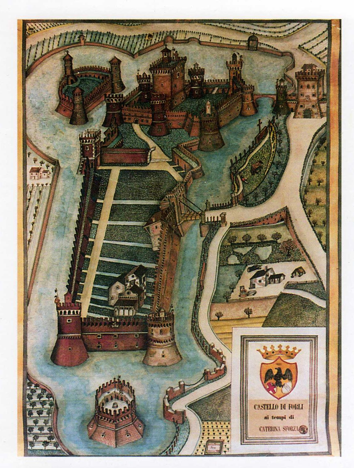 Incisione di inizio '800 che raffigura l'aspetto della Rocca di Ravaldino ai tempi di Caterina Sforza, foto propria